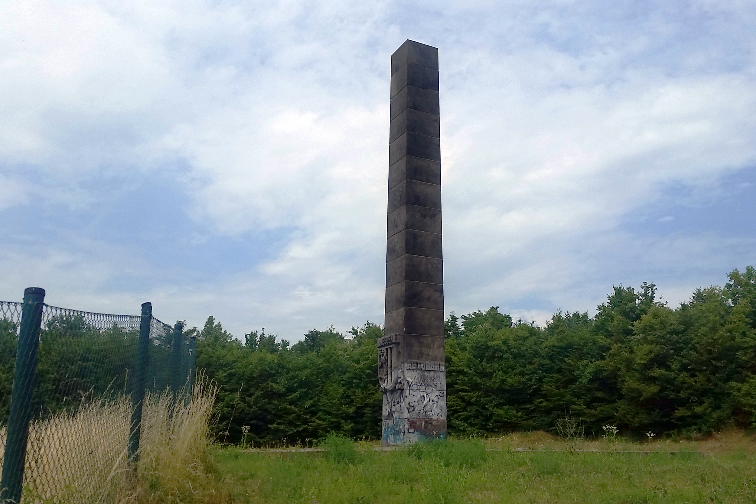 Der Autobahn-Obelisk in Dresden-Kaditz an der Autobahnanschlussstelle Dresden-Neustadt